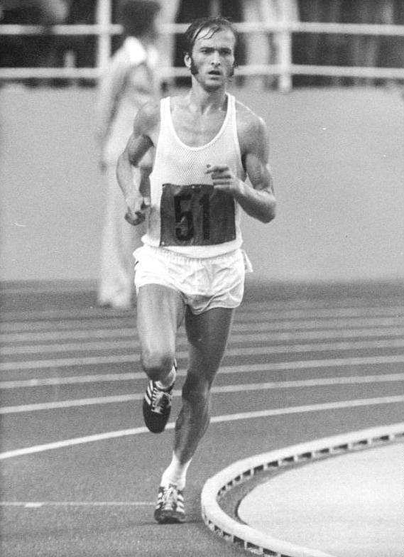 ADN-ZB Gahlbeck 31.7.76 Montreal: XXI. Olympische Sommerspiele-Leichtathletik-Wer hatte an Waldemar Cierpinski gedacht, als die Rede von den Favoriten des olympischen Marathon-Laufes war? Der 1,70 m große und 58 Kilo schwere Hallenser lief zuerst in einer Spitzengruppe, setzte sich dann mit dem haushohen Favoriten Frank Shorter (USA) ab, schüttelte auch diesen noch ab und kam ganz allein im Stadion an.